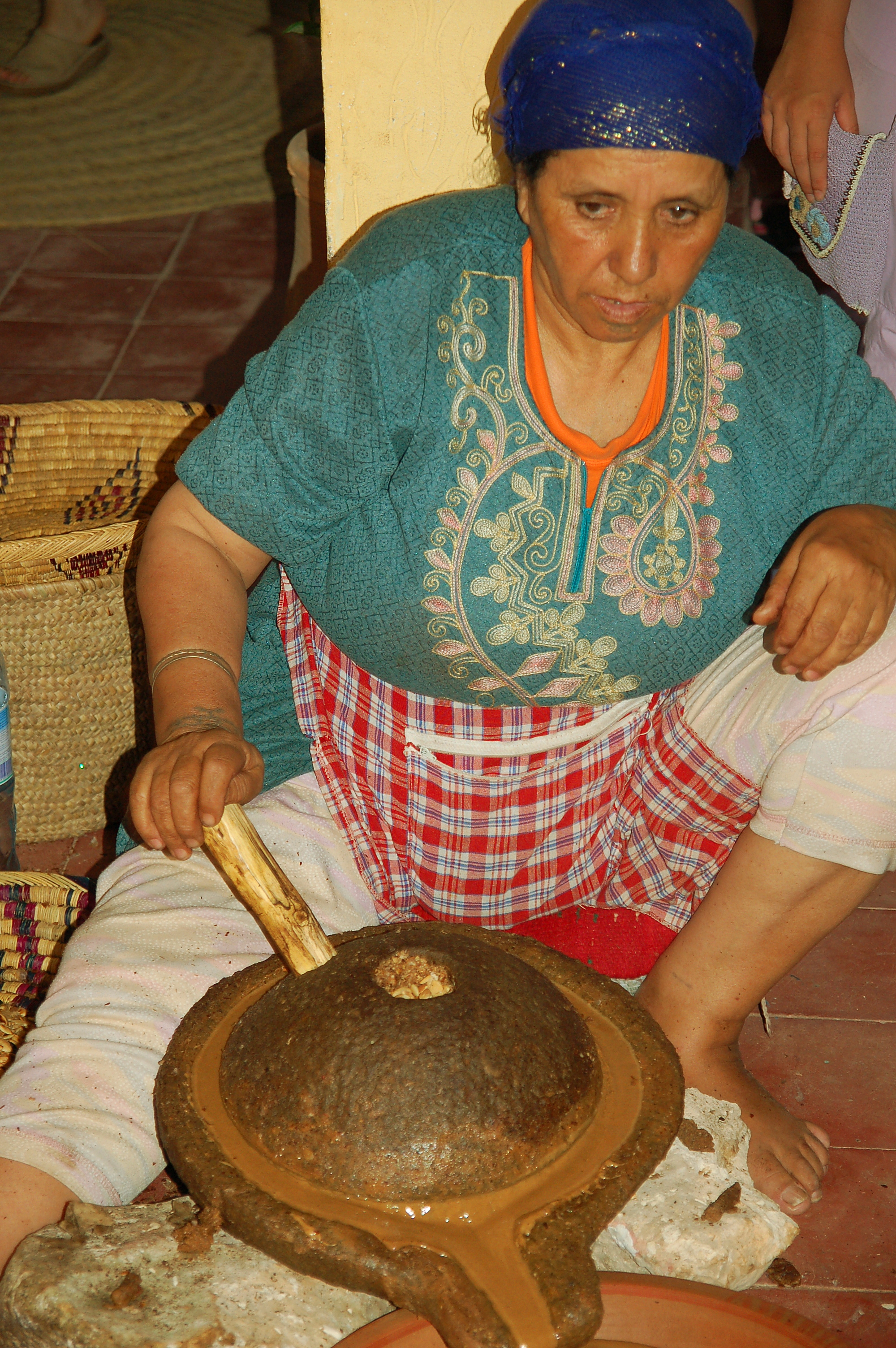 Maroc Essaouira city